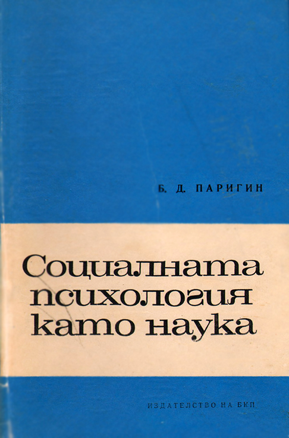 Б.Д. Паригин. Социалната психология като наука. София - 240 с